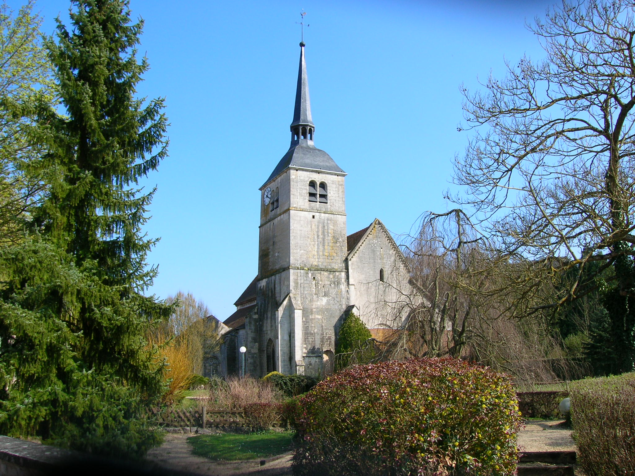 Eglise à Arc-en-Barrois.